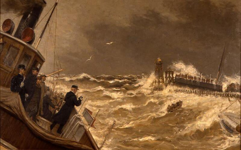 Prins Hendrik bezoekt de ramp met stoomschip Berlin (1907), door Gerard van Hove